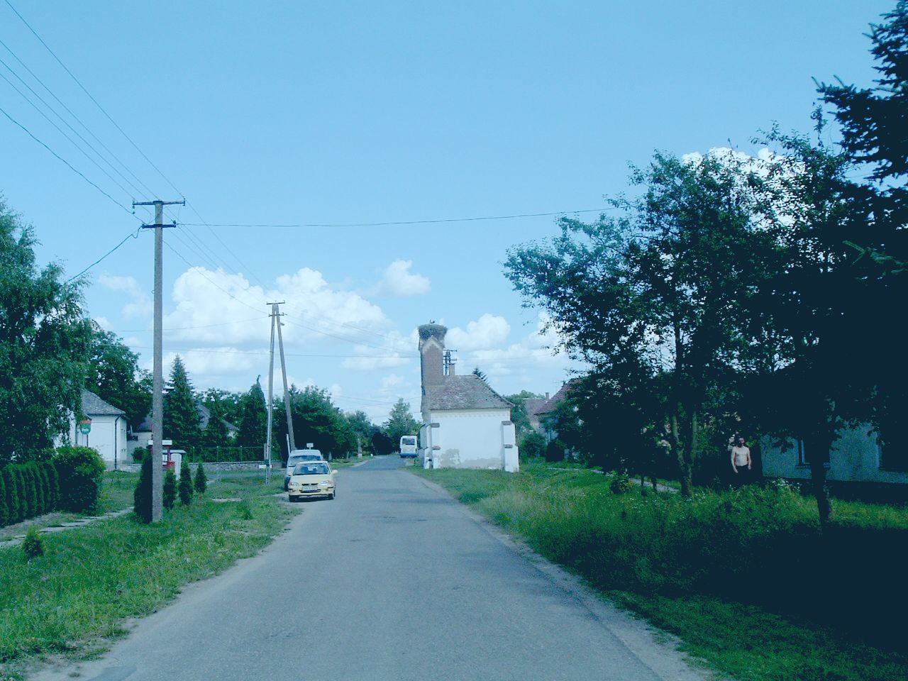 Taródháza (Sorkifalud), Hungary